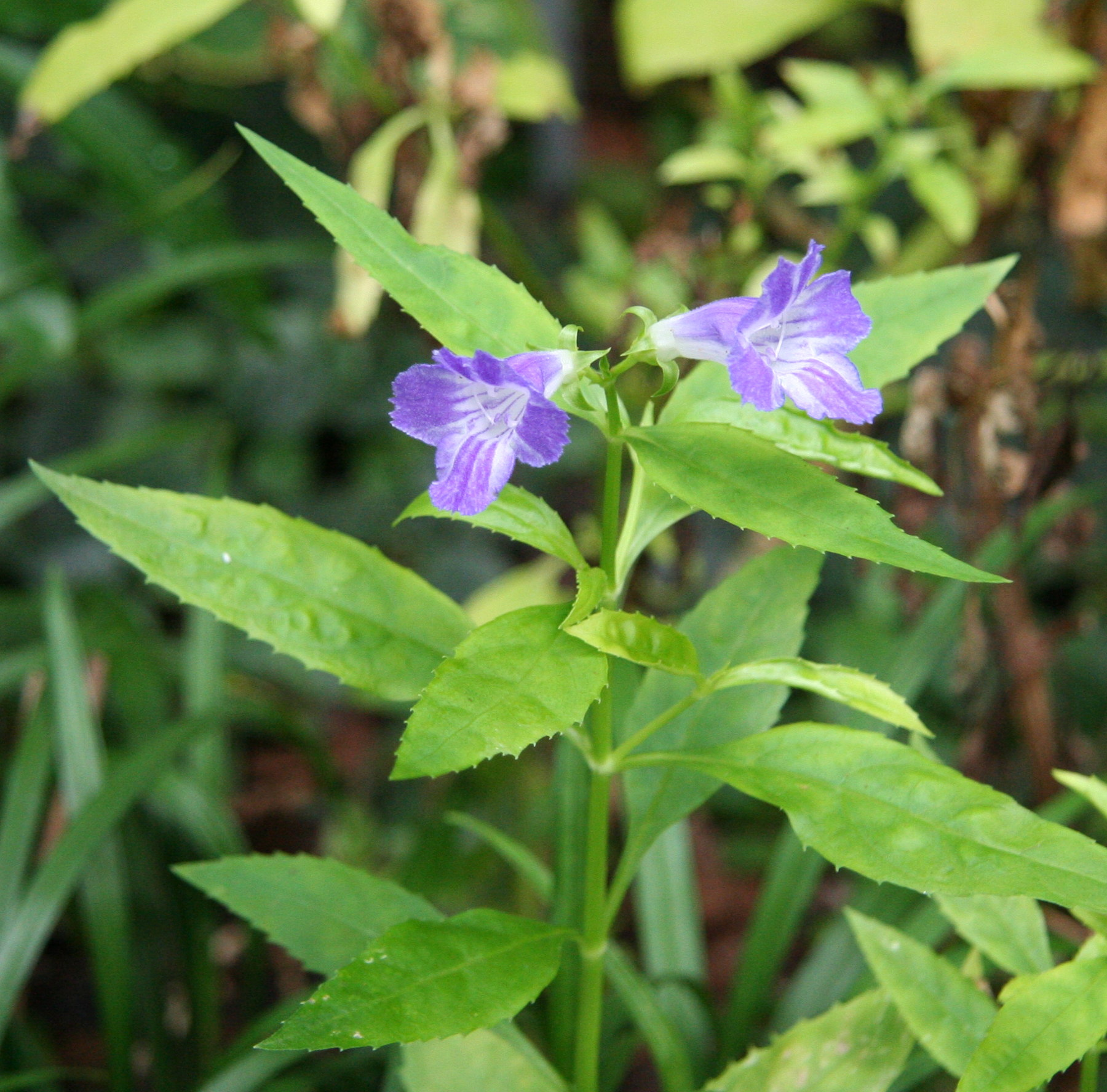 Artanema fimbriatum im Botanischen Garten Dresden